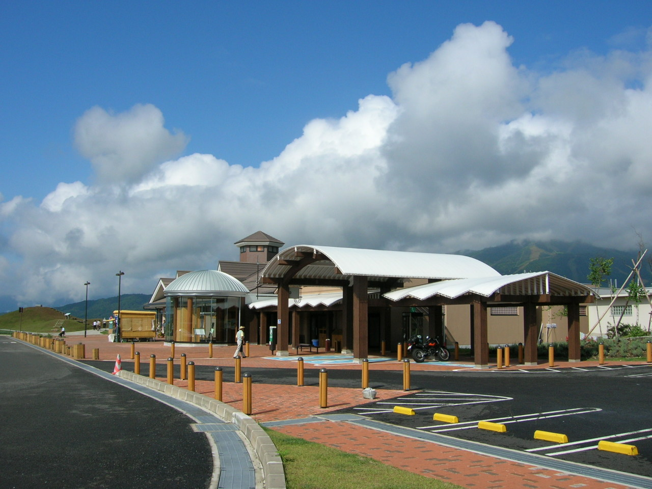 Hirugano kōgen Service area (Hirugano Plateau Rest area), TOKAI-HOKURIKU EXPRESSWAY. Loc: Gujo city, Gifu Prefecture, Japan ひるがの高原サービスエリア(東海北陸自動車道・下り線) 撮影場所 岐阜県郡上市